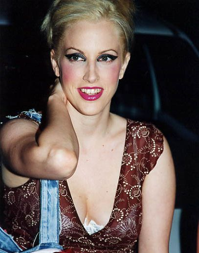 Orly Weinerman